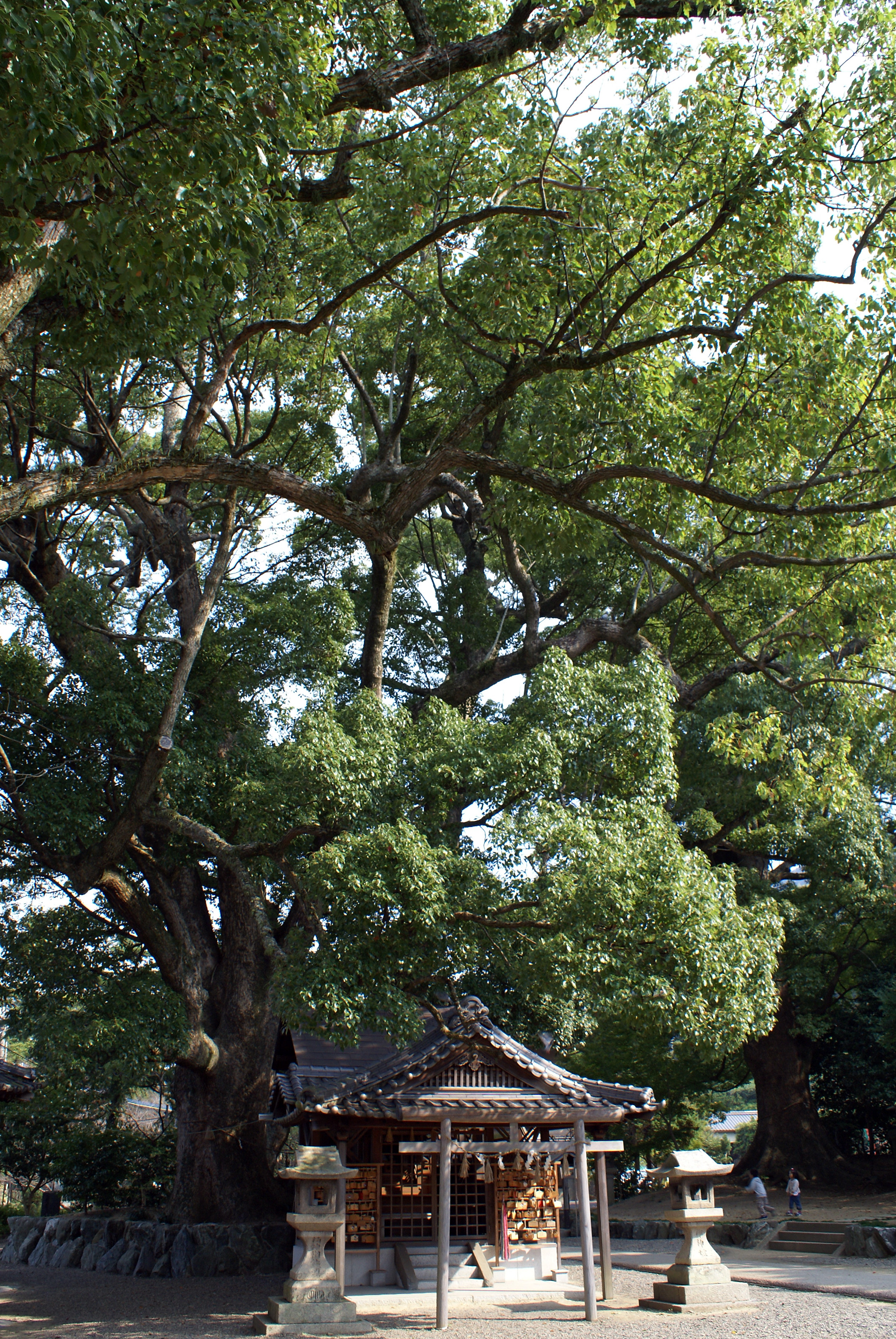 Fujishiro-jinja in Kainan, Wakayama, Japan